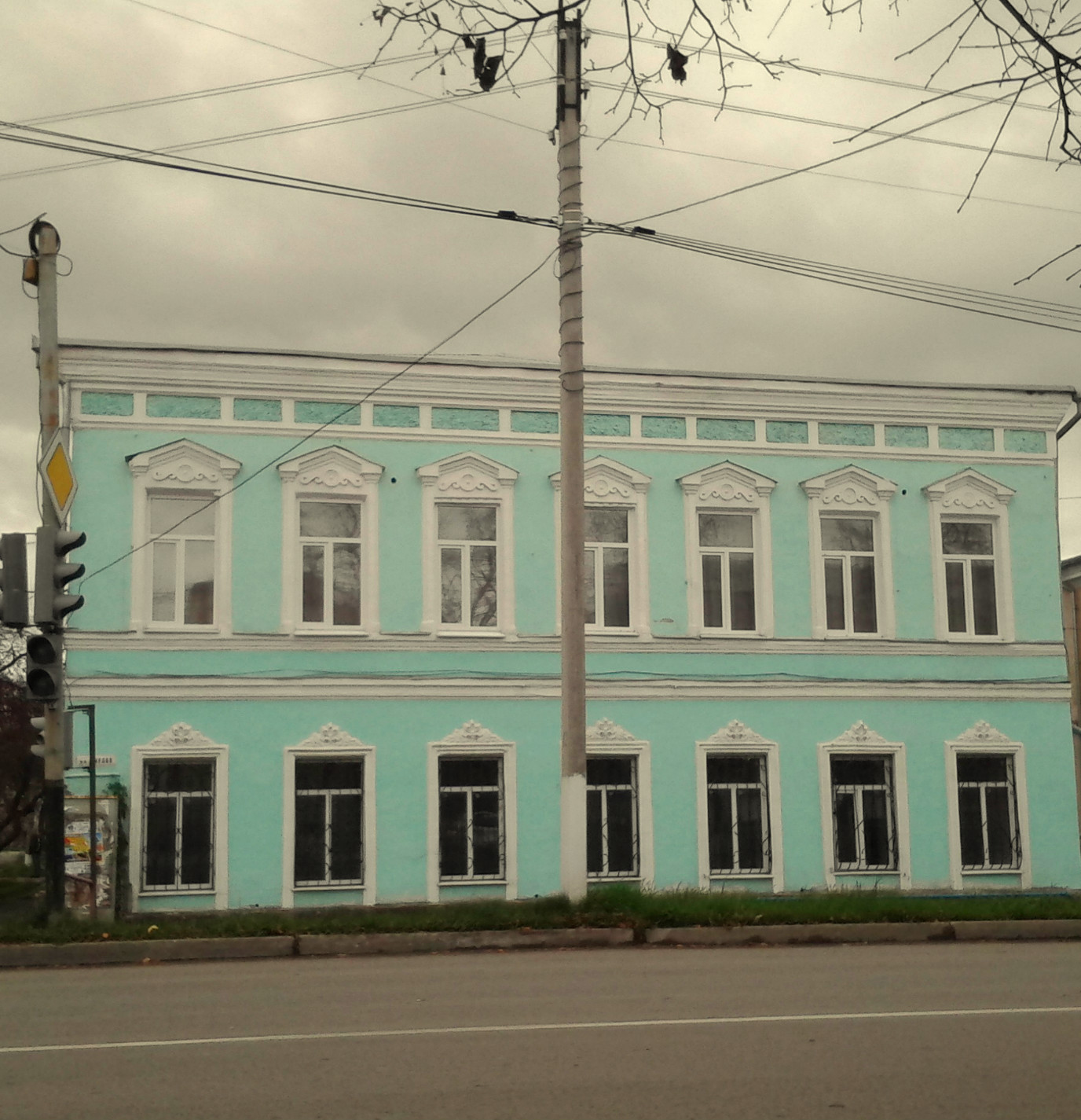 здание, где размещался первый ирбитский уездный исполком советов рабочих, крестьянских и солдатских депутатов: улица кирова, 74, Ирбит, Свердловская область